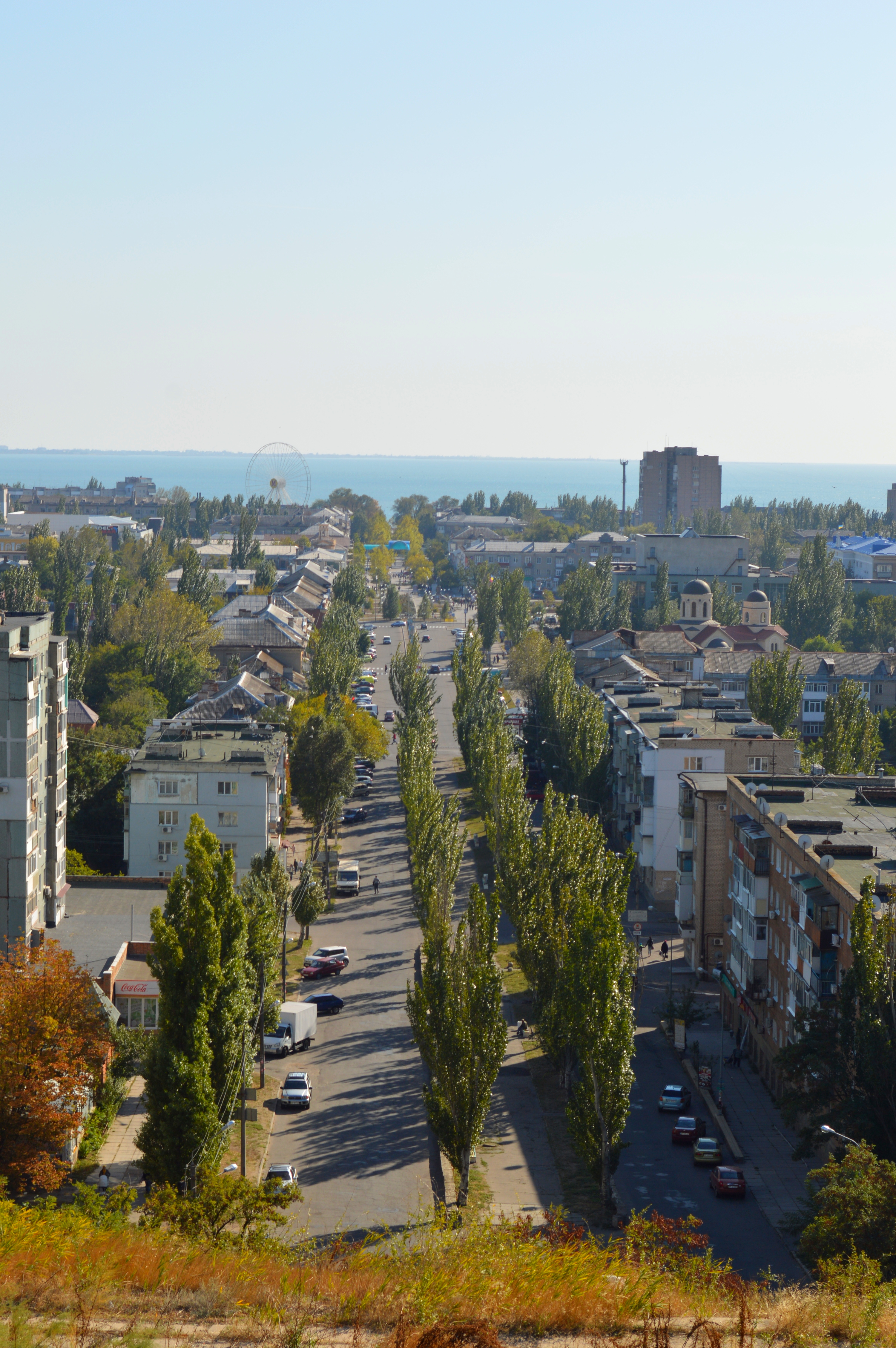 Леніна проспект, Бердянськ, просп. Азовський (Леніна)